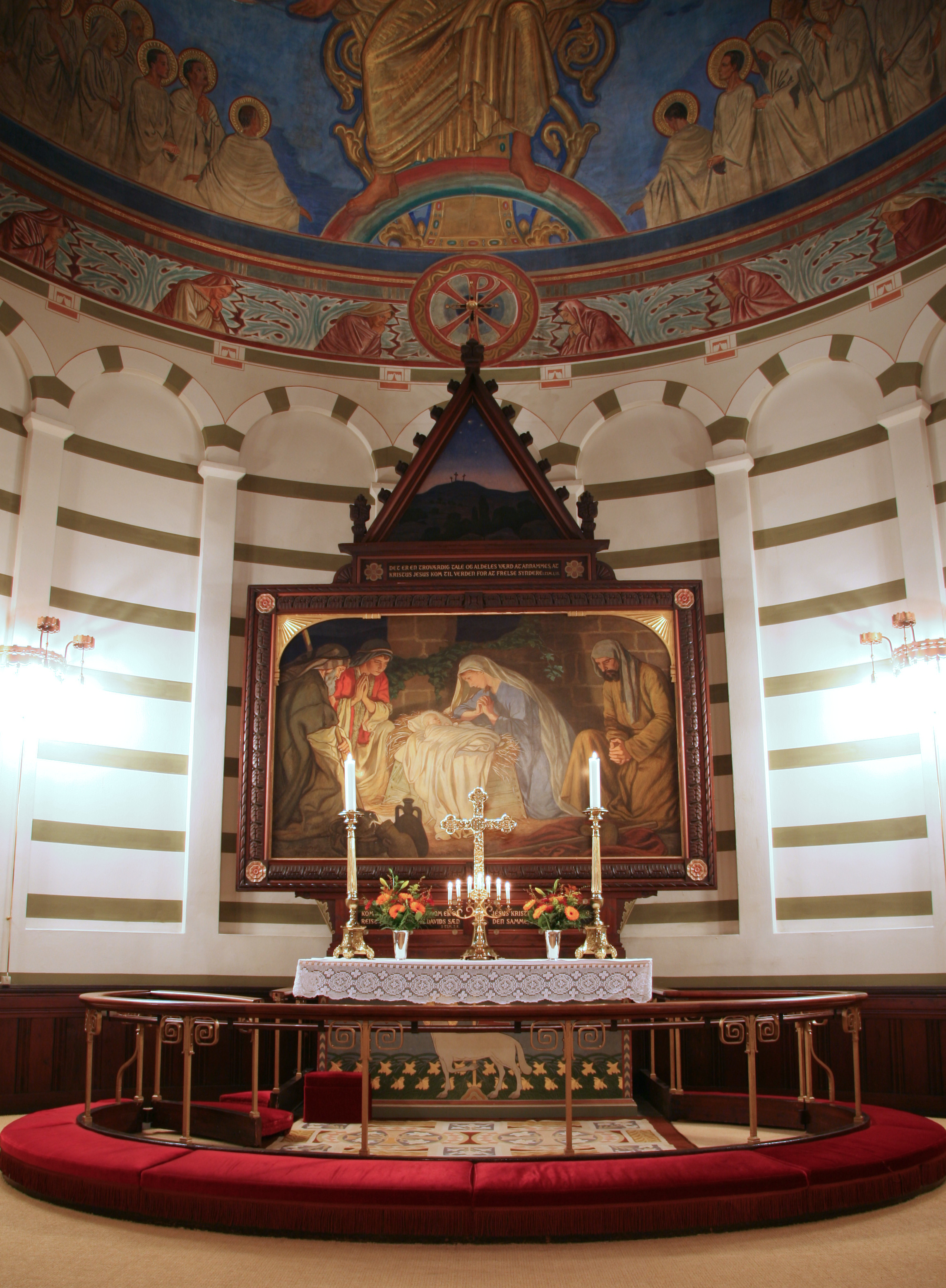 Kristkirken, Vesterbro, Copenhagen Denmark. Altar